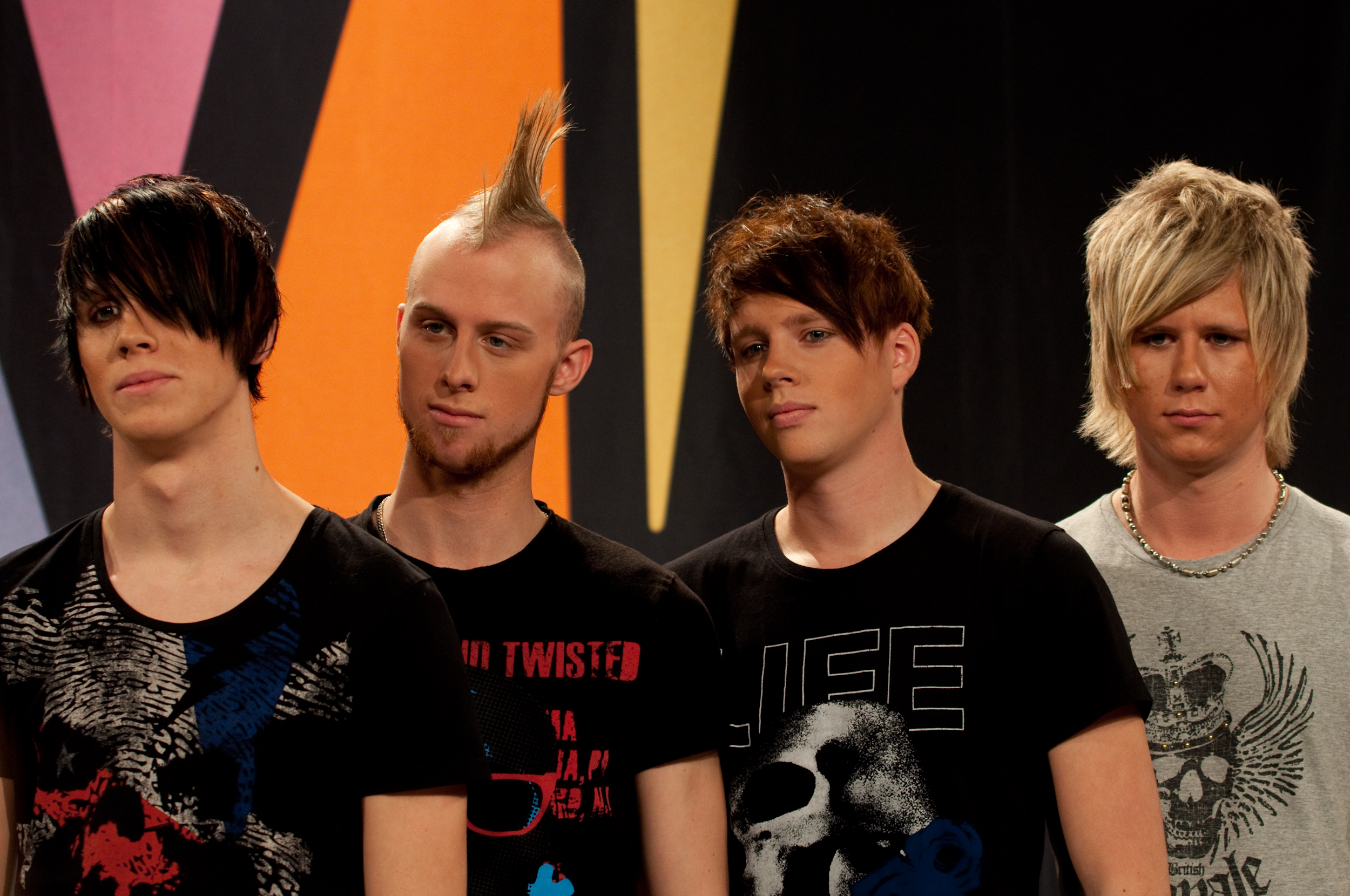 Noll disciplin 2009 at a press conference for Melodifestivalen 2010